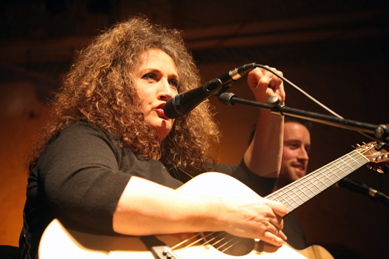 Anne Haigis eröffnet mit ihren Liedern den Auftritt mehrerer Künstler am Rand der Kulturkonferenz. Die gebürtige Schwäbin lebt jetzt in Köln und begeistert die Gäste mit alten und neuen Songs.